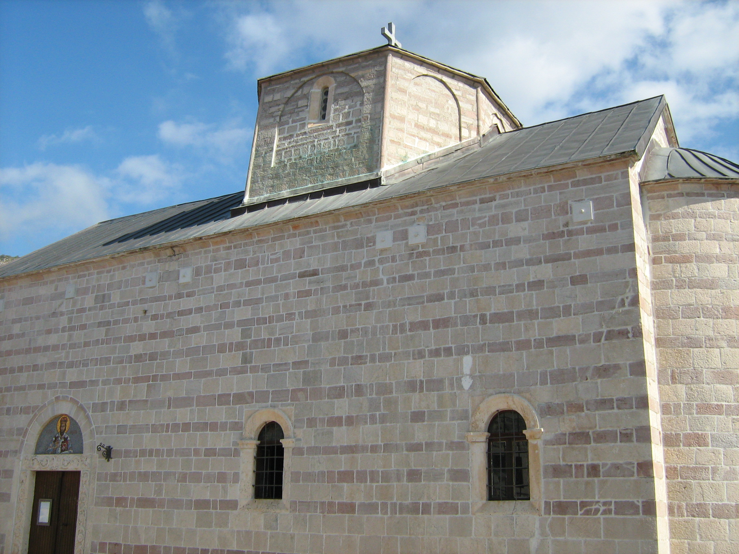 Манастир Подмаине. Аутор: Ђорђе Стакић, 9. септембар 2010.